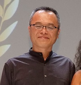 Koji Yamamura au festival international du film d'animation d'Annecy 2019.